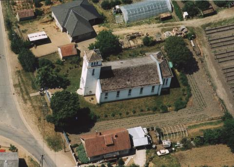 Papos, Hungary, aerialphotography, Nagyboldogasszony római katolikus templom